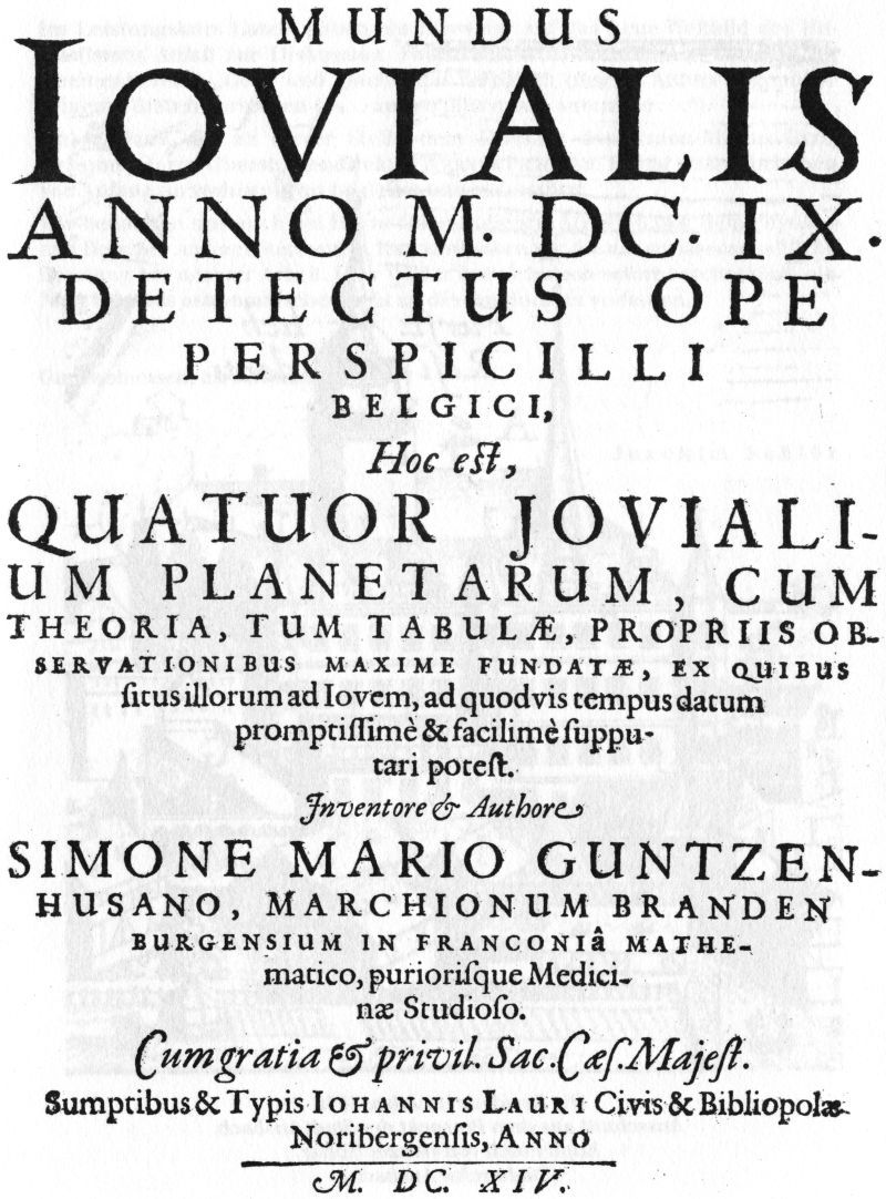 Titel des Mundus Iovialis